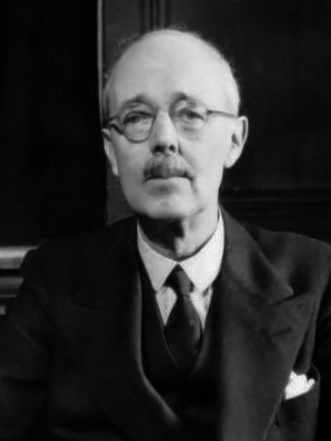 Jhr. Mr. G.C.W. van Tets van Goudriaan, directeur van het Kabinet der Koningin. 1940-1945